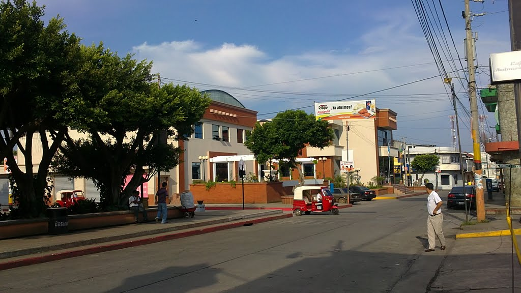 municipalidad